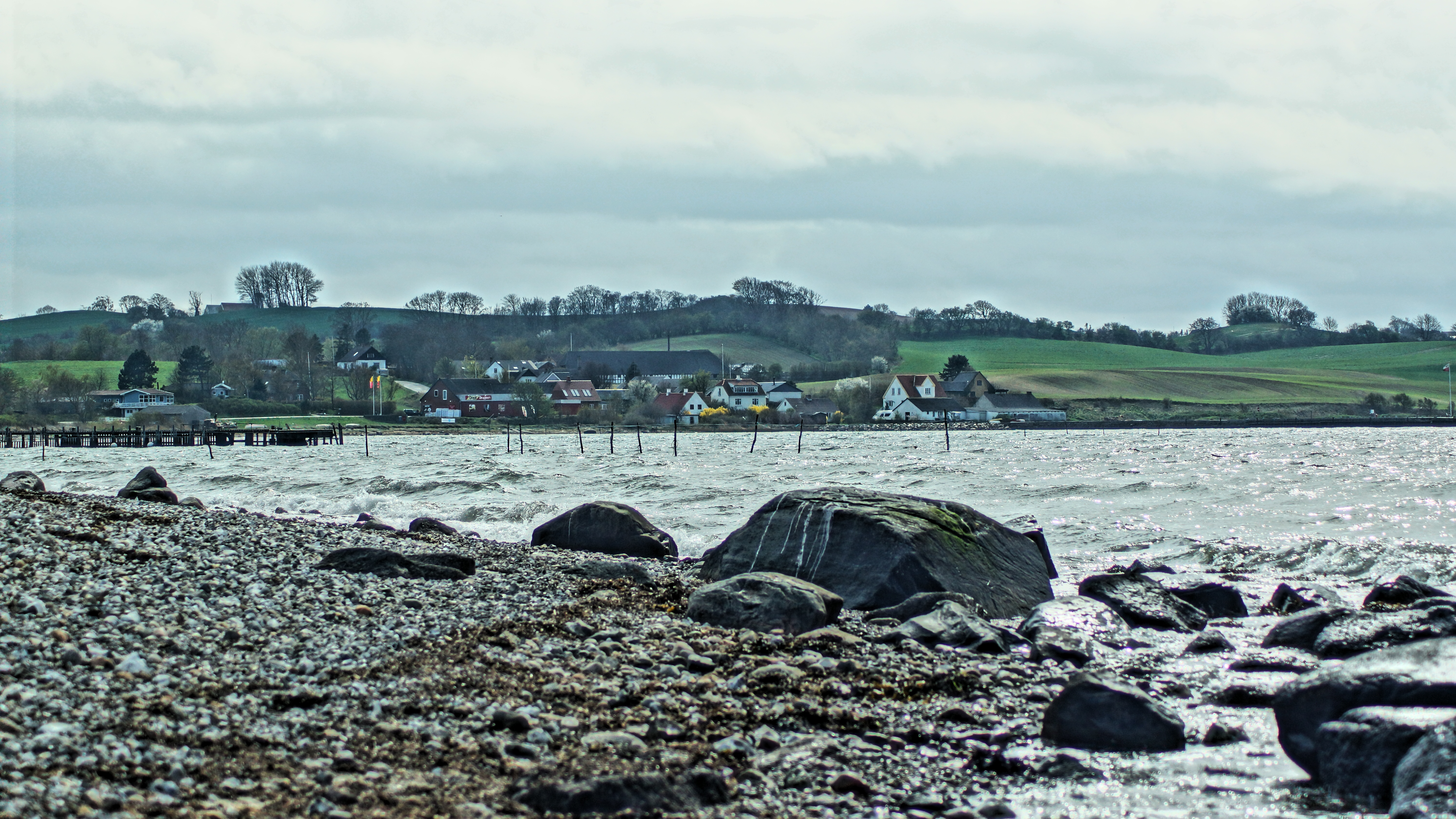 Kongsgårde set langs kysten